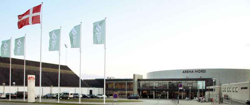 Arena Nord, sport- and congresscenter, Frederikshavn, Demark. Photo taken by Jørgen Larsen, 2007-03-13.